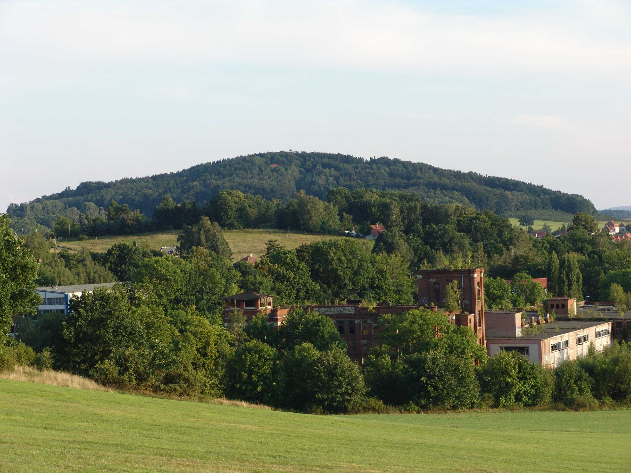 Schlechteberg in Ebersbach/Sa., Landkreis Görlitz, Sachsen